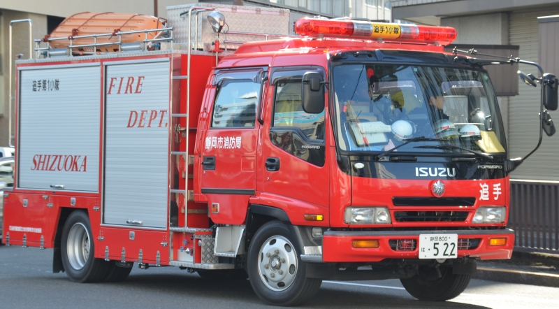 静岡市消防局の化学車